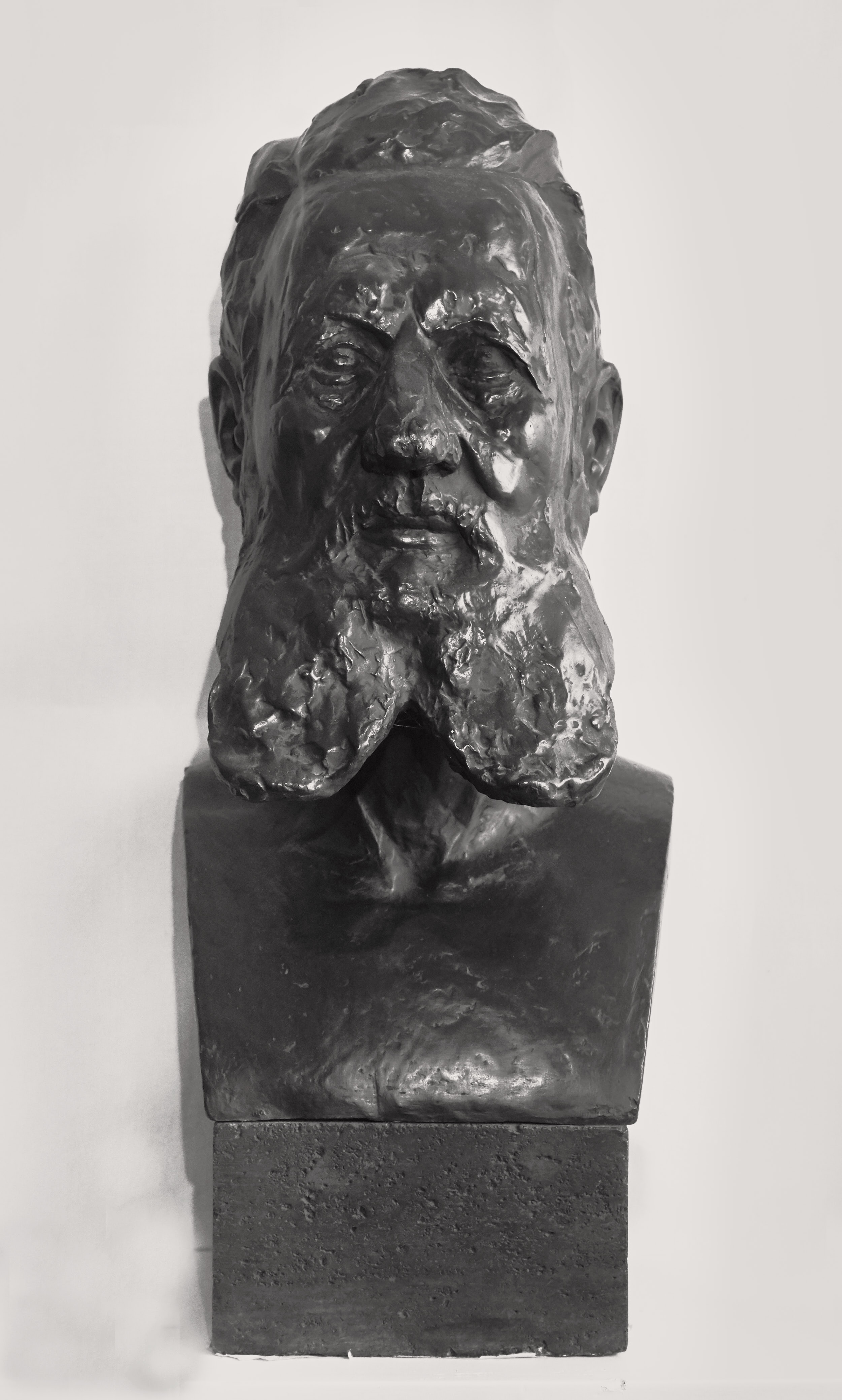 Plastik im Familienbesitz der Nachkommen von Franz Adickes.